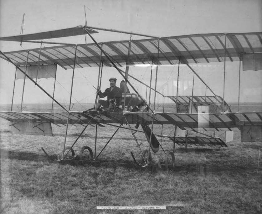 Photo d'Auguste Junod en 1910 à l'Aérodrome de Pontarlier